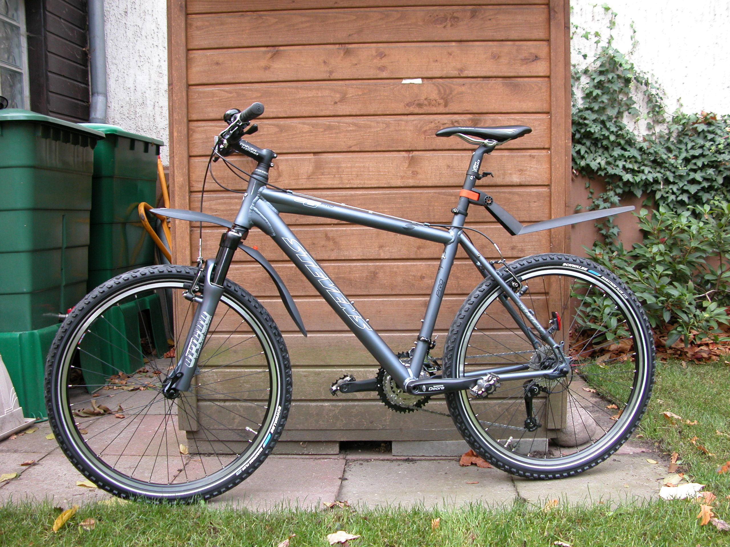 Stevens S6 Pro 2007